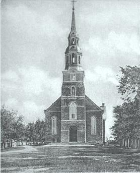 Église de la paroisse Saint-Martin de Laval avant l'incendie de 1942